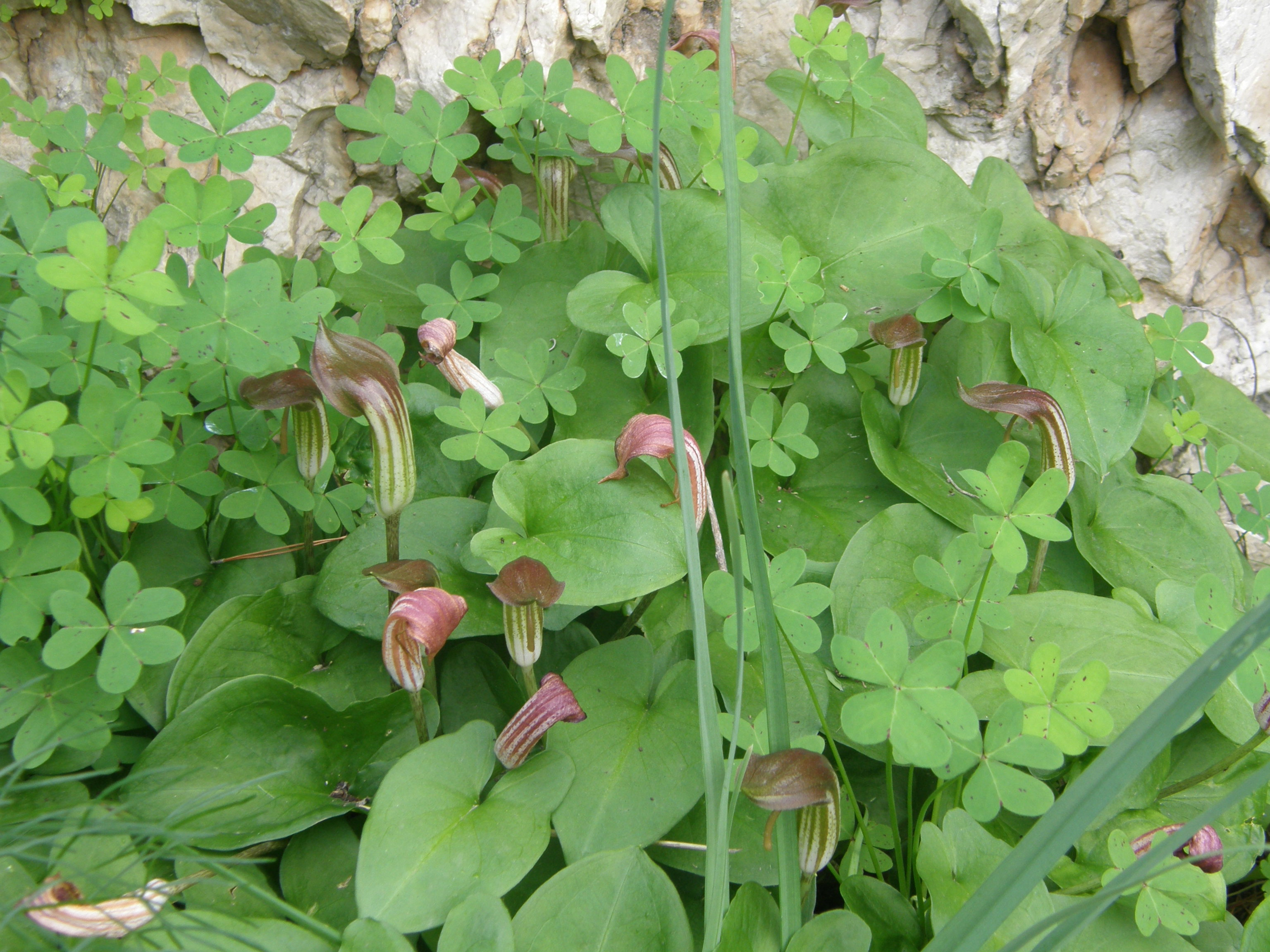 Arisarum vulgareMonte Pellegrino